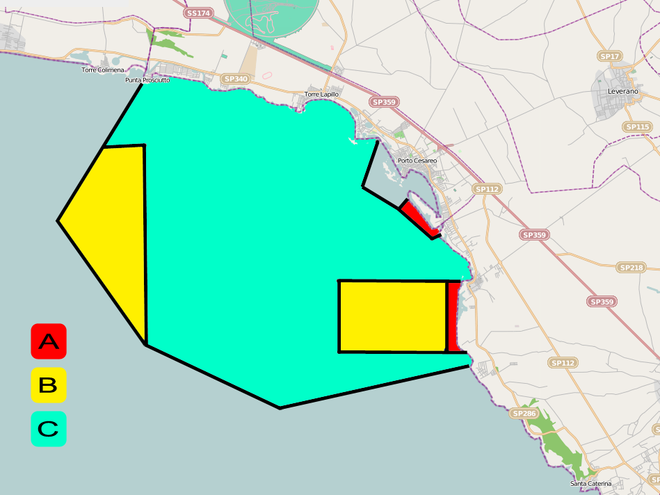 mappa A.M.P. Porto Cesareo This map may be incomplete, and may contain errors. Don't rely solely on it for navigation.